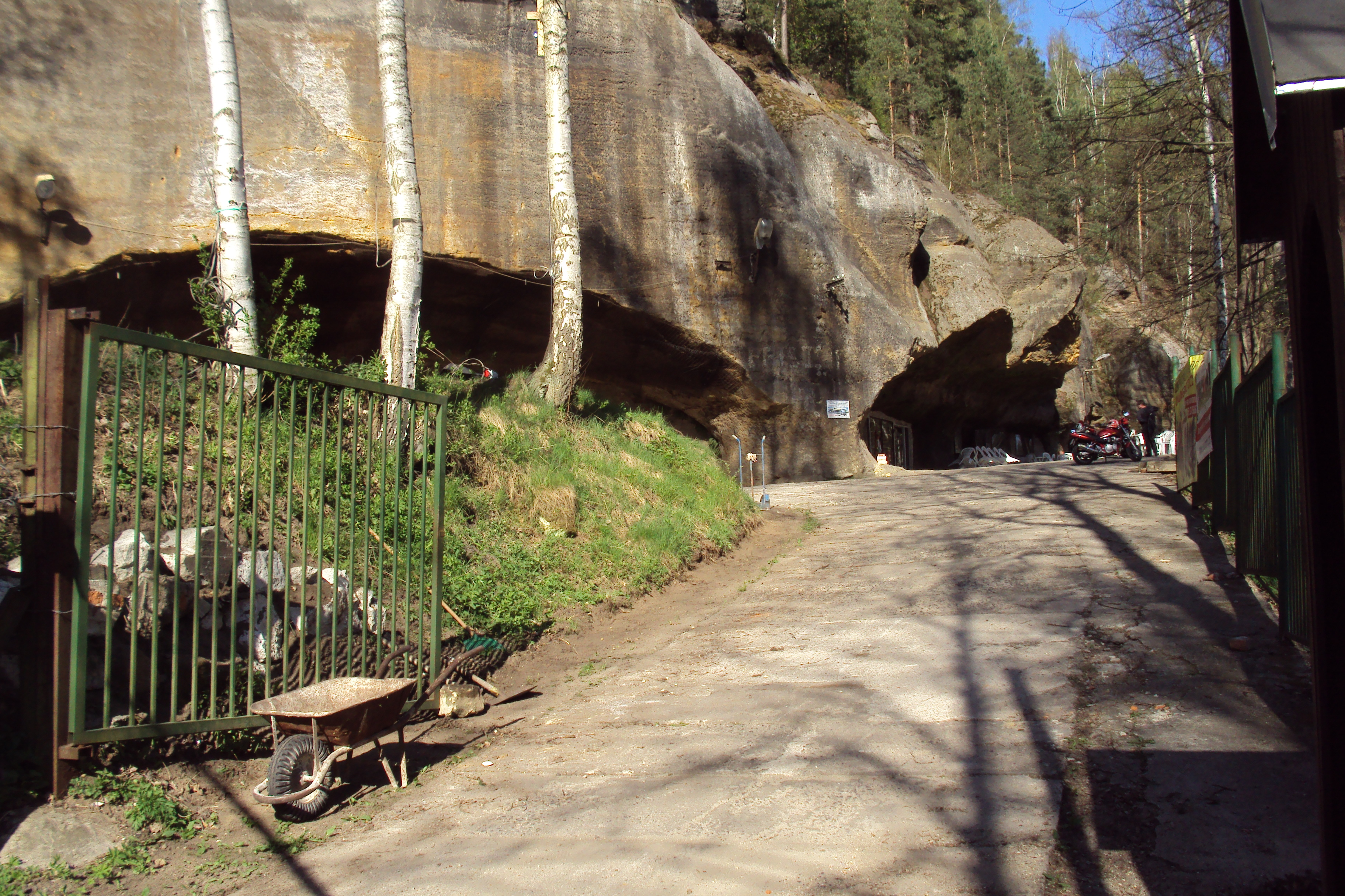 Motorkářská jeskyně na katastru obce Svitava u Cvikova, jeskynní komplex Pusté kostely, u silnice Svitava-Velenice